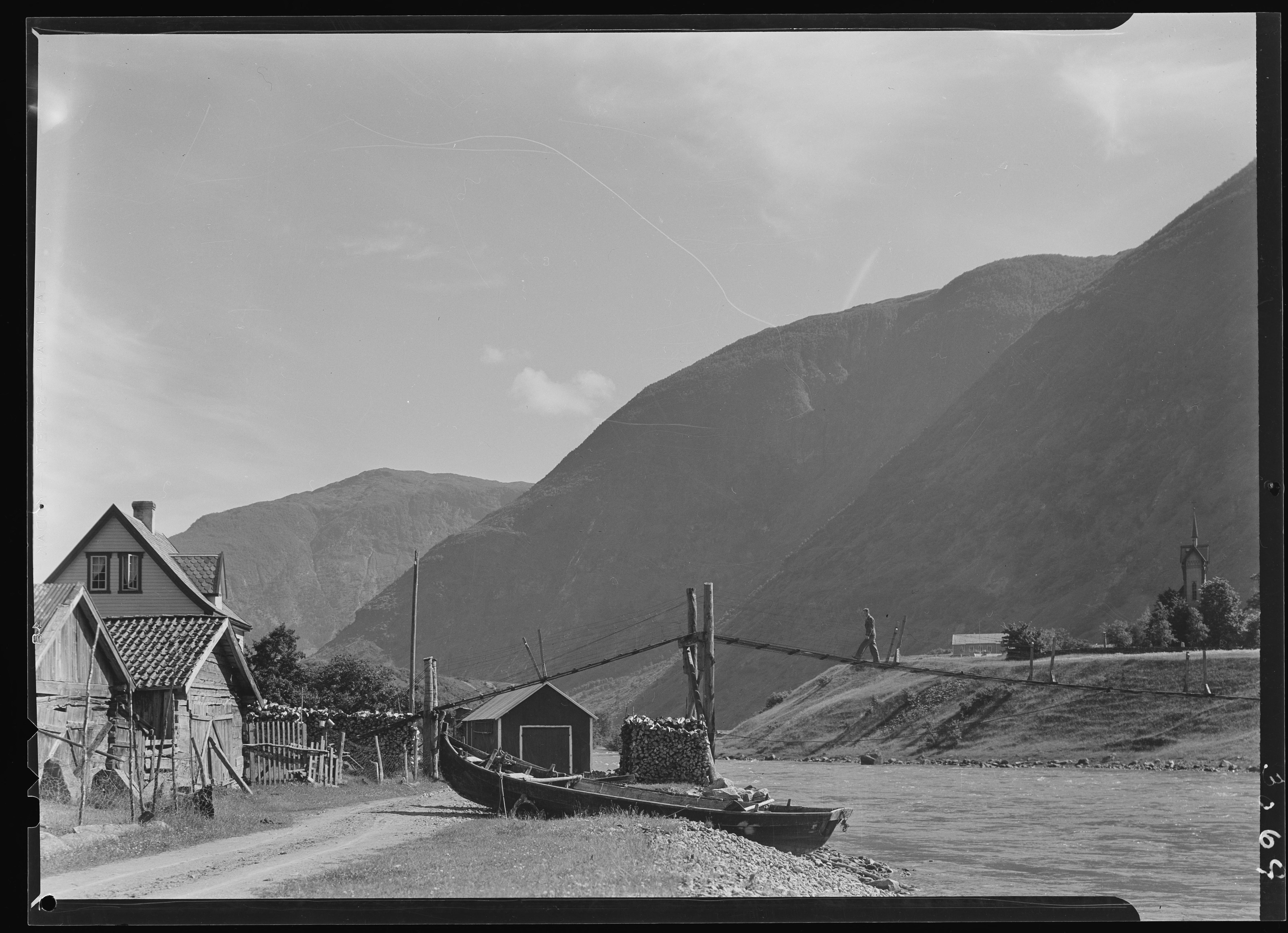 Bildet er hentet fra Nasjonalbibliotekets bildesamling. Anmerkninger til bildet var: Fotograf : ukjent Årdalstangen, Årdal, Sogn og Fjordane